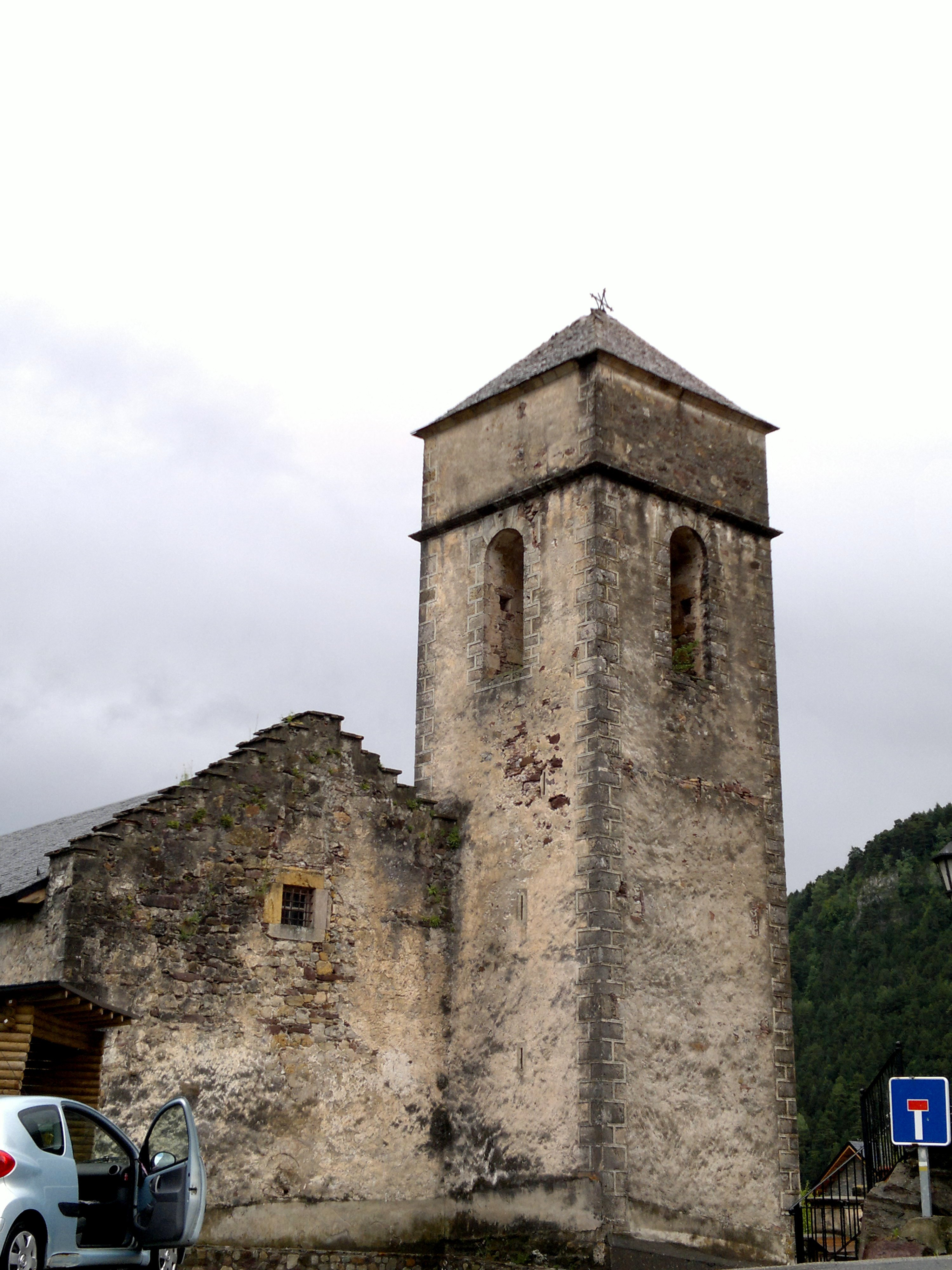 Église Santa Eulalia, Sp-Javierre de Bielsa.